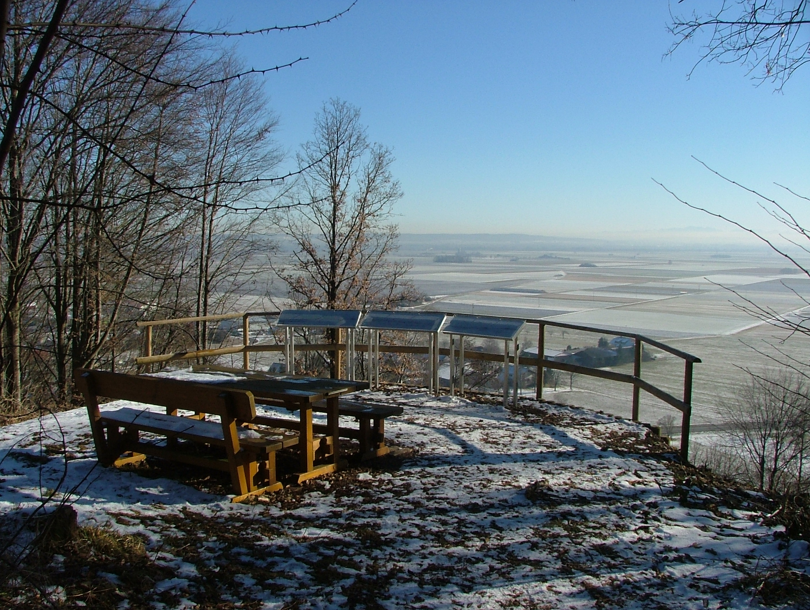 Erolzheim - Aussichtspunkt bei der Frobergkapelle oder auch Maria im Busch genannt.